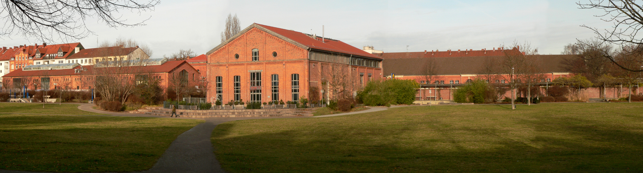 Militärreitinstitut Hannover